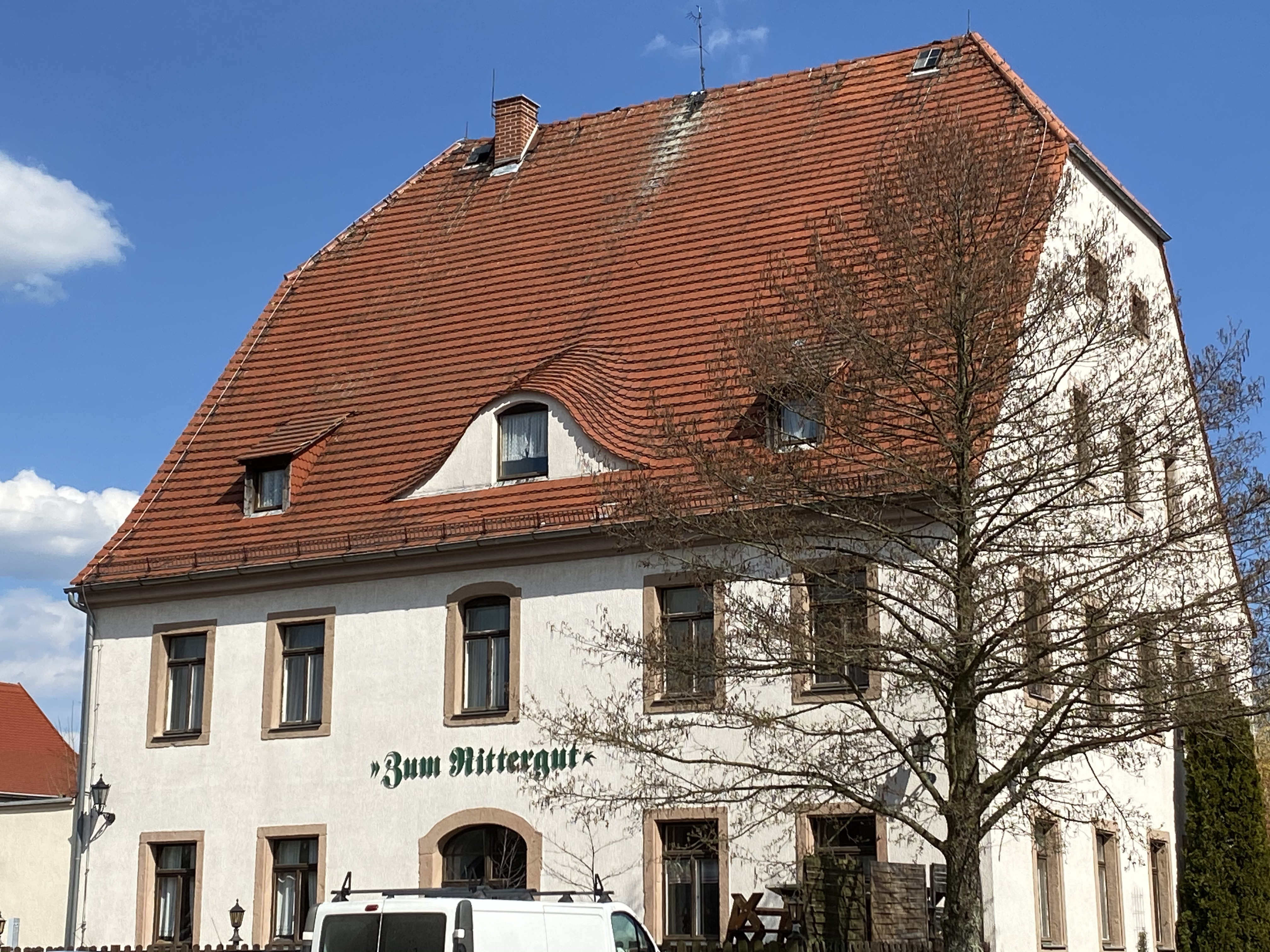 Rittergut Irfersgrün (2020)